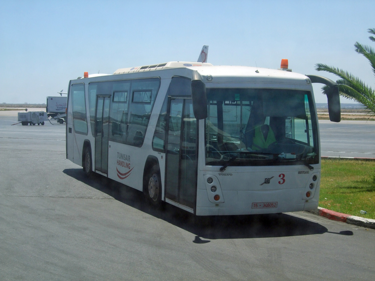 Ein Zubringerbus der Tunisair, Typ "Volvo Setcar", auf dem Flughafen Monastir